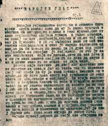 Народен глас